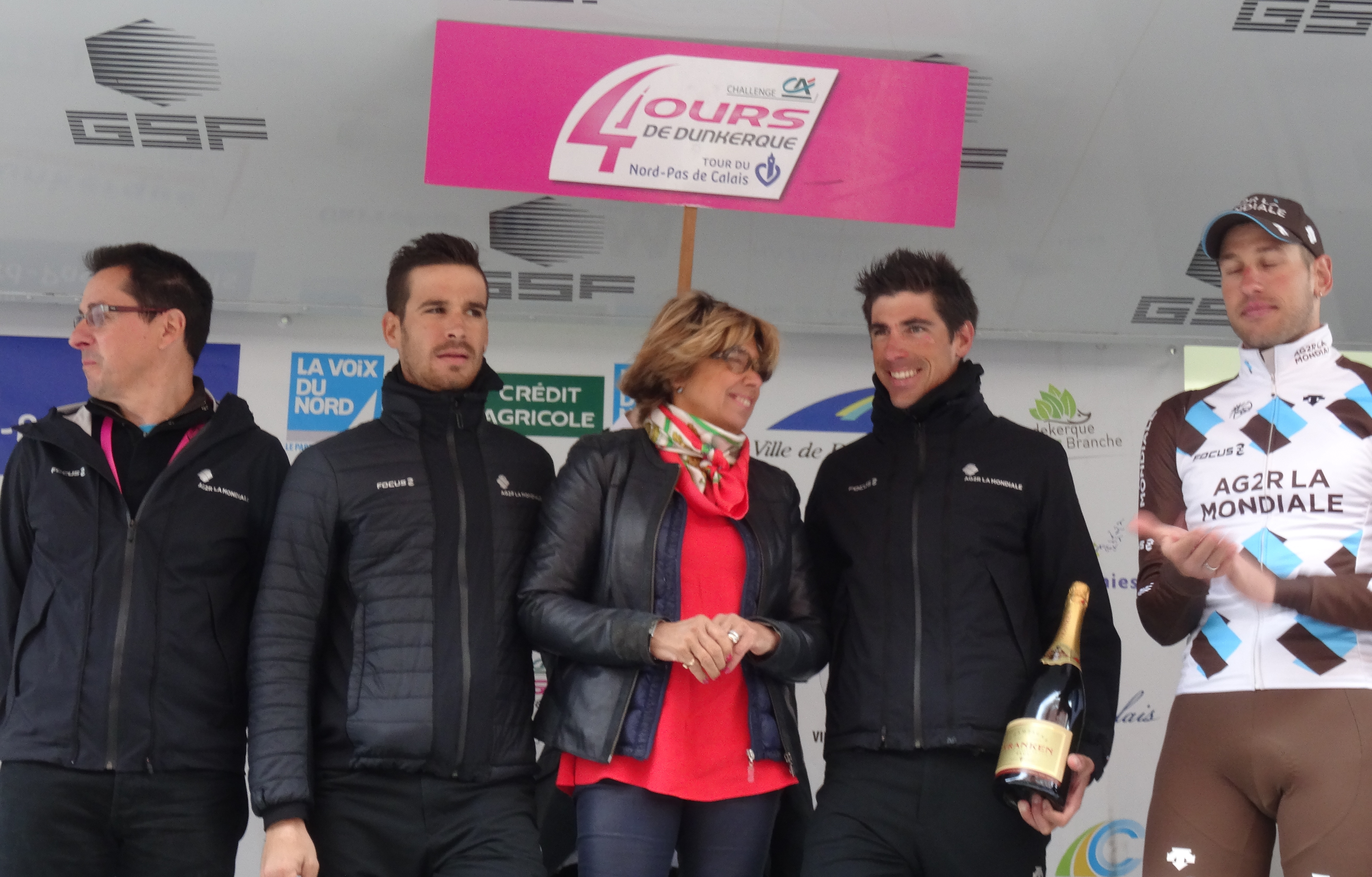 Reportage photographique réalisé le dimanche 11 mai 2014 à l'arrivée de la cinquième et dernière étape de l'édition 2014 des Quatre jours de Dunkerque à Dunkerque, Nord, Nord-Pas-de-Calais, France. Depicted people: Gilles Mas, Blel Kadri, Sébastien Minard and Gediminas Bagdonas Depicted team: AG2R La Mondiale